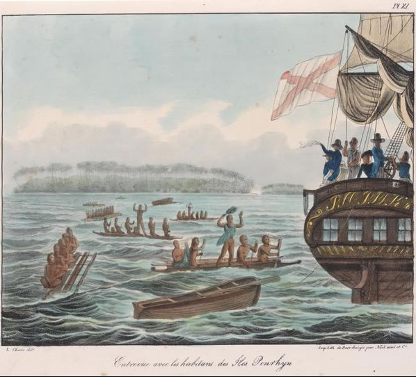 Passage du Brick le Rurick du du Capitaine Otto Von Kotzubue le 30 avril 1816 sur l'île de Penrhyn (Tongareva) aux îles Cook (Cook Islands)